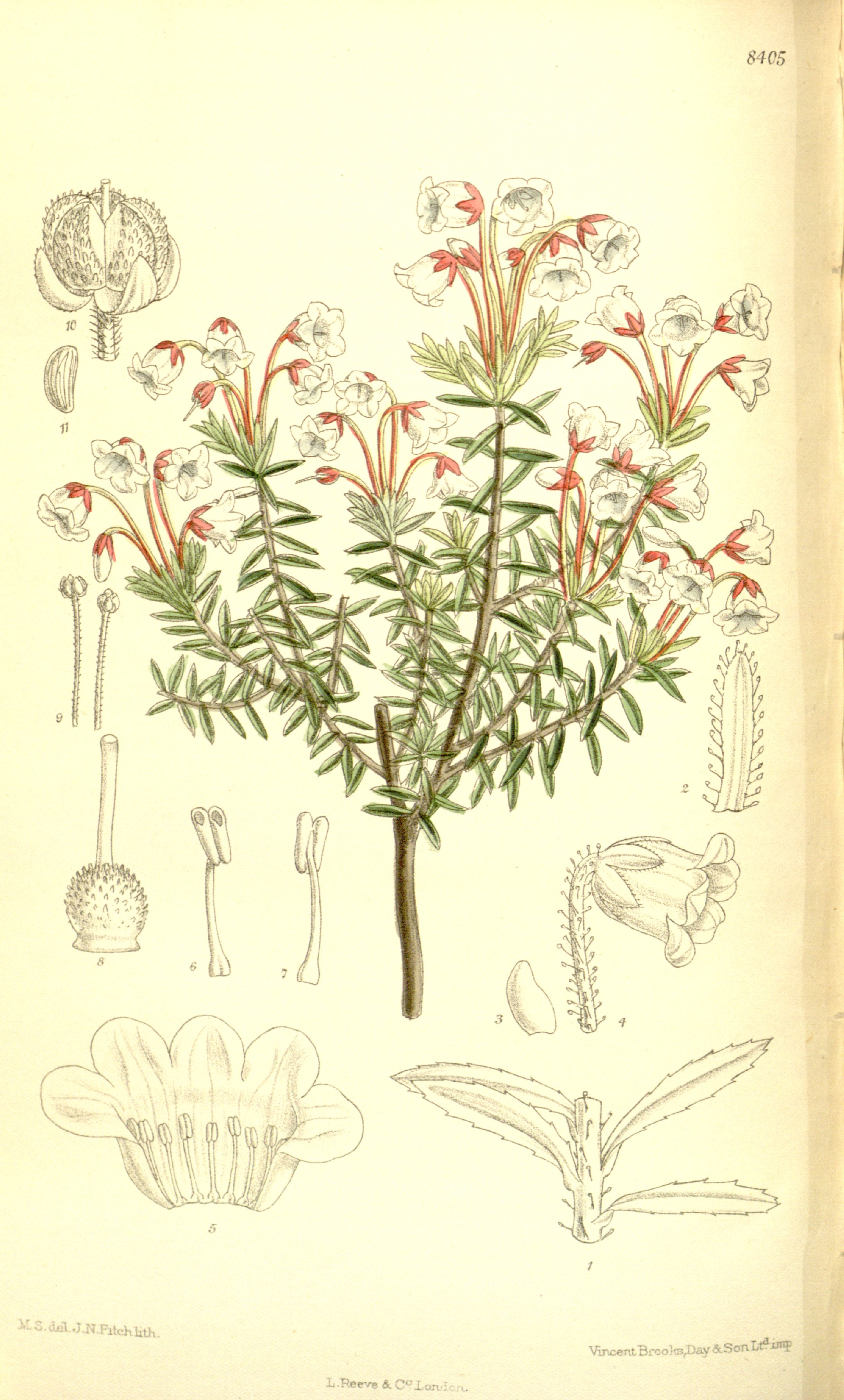 Phyllodoce nipponica var. nipponica (as Phyllodoce amabilis Stapf), Ericaceae